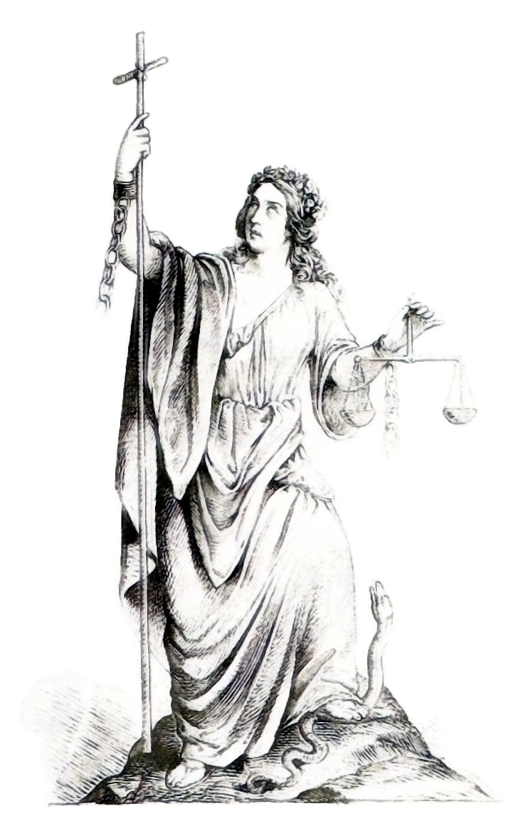 Statuia Libertății - realizată de Constantin Daniel Rosenthal. Această imagine a statuii a fost publicată în Illustrirte Zeitung din Leipzig, no. 317/28 iulie 1849